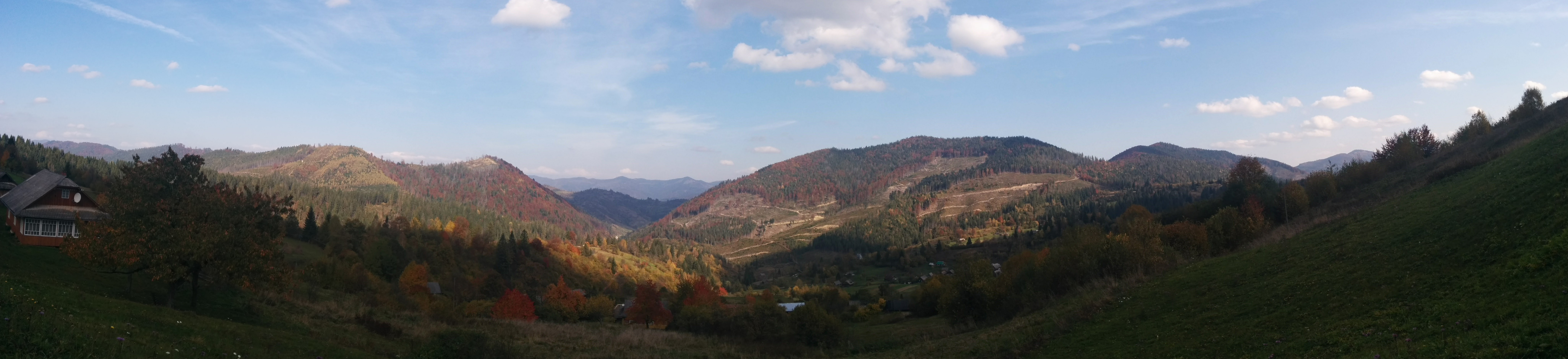 панорама на гори Маківка і Клива